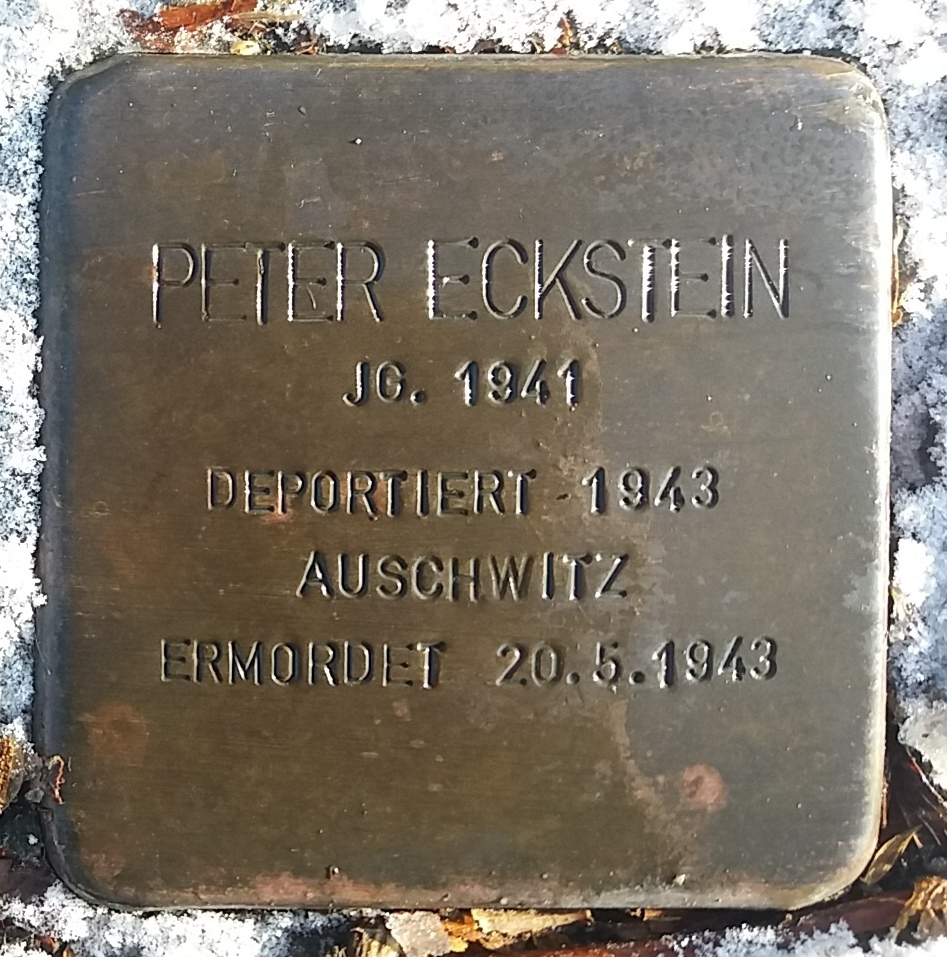 Stolperstein für Peter Eckstein, Mitglied der Großfamilie Eckstein, Vöhringen (Iller)